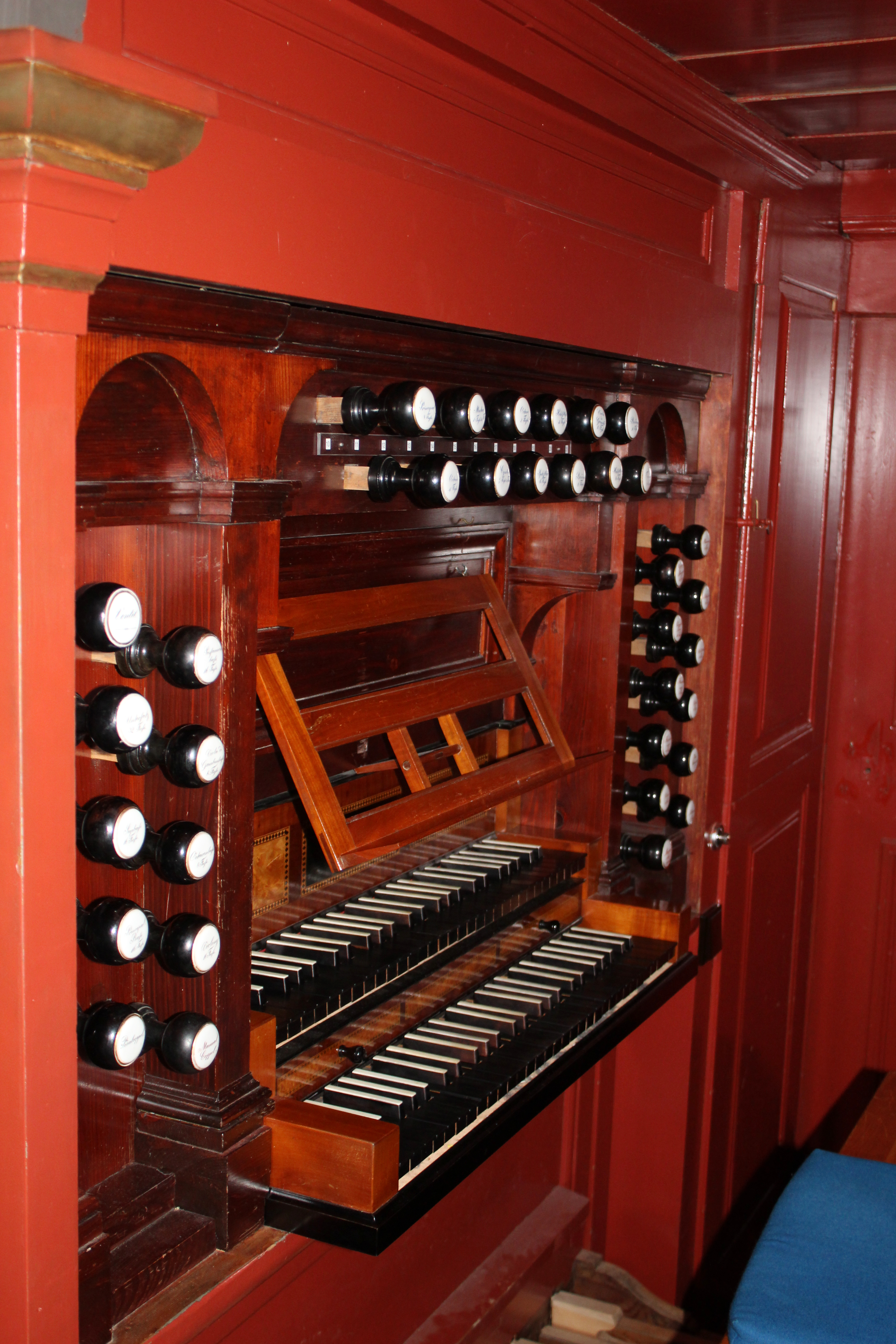 Evangelische Kirche Niedergründau, Gemeinde Gründau, Main-Kinzig-Kreis, Hessen, Deutschland